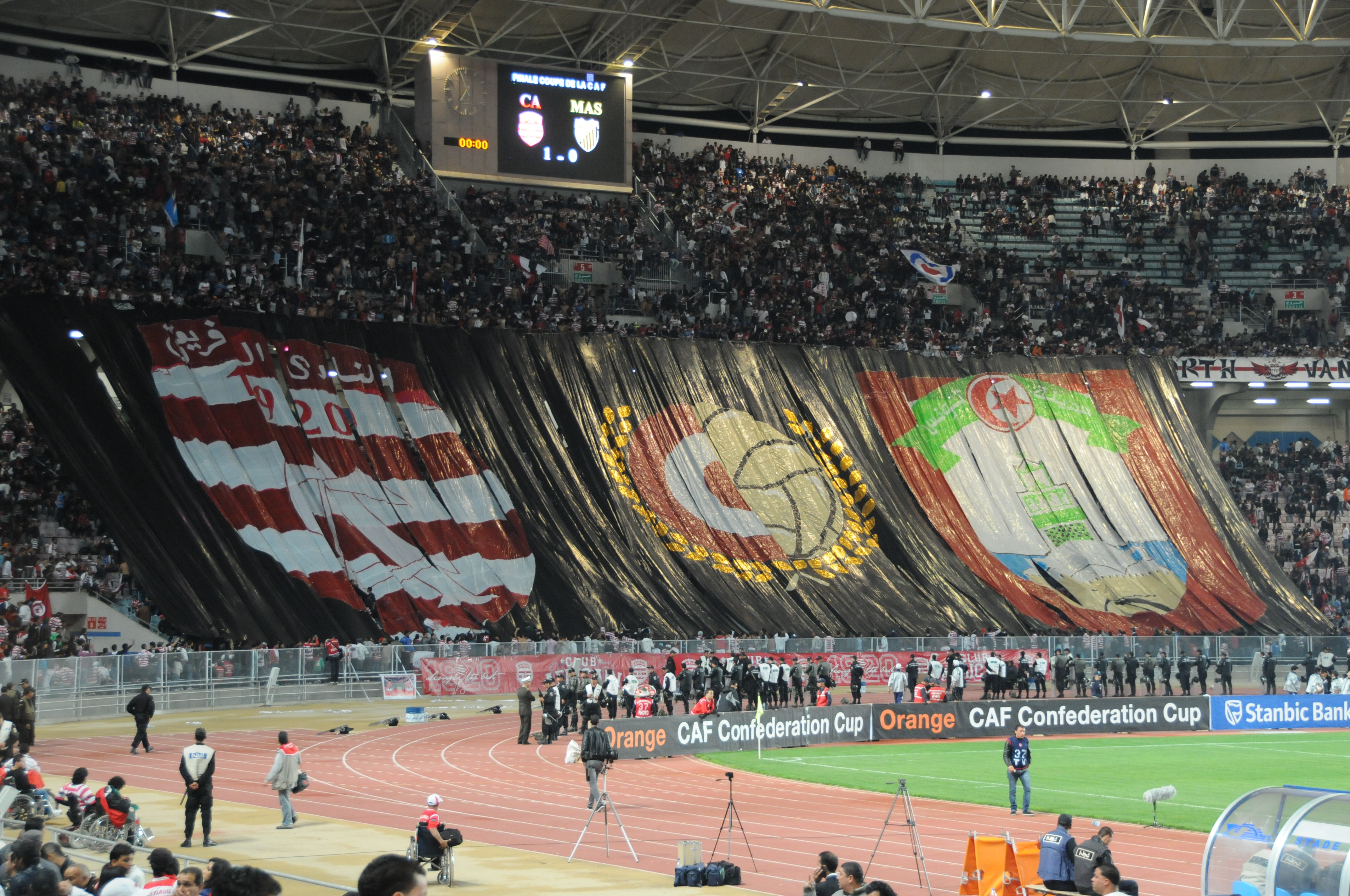 Match de la ligue d'Afrique de Football entre le CA tunisien et le MAS marocain de Fès.